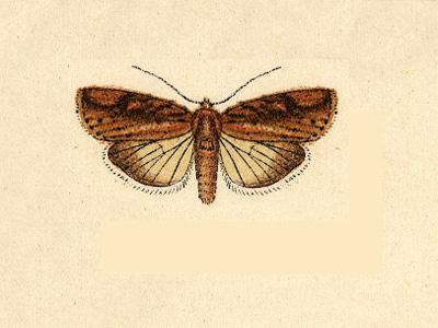 Macapta albivitta